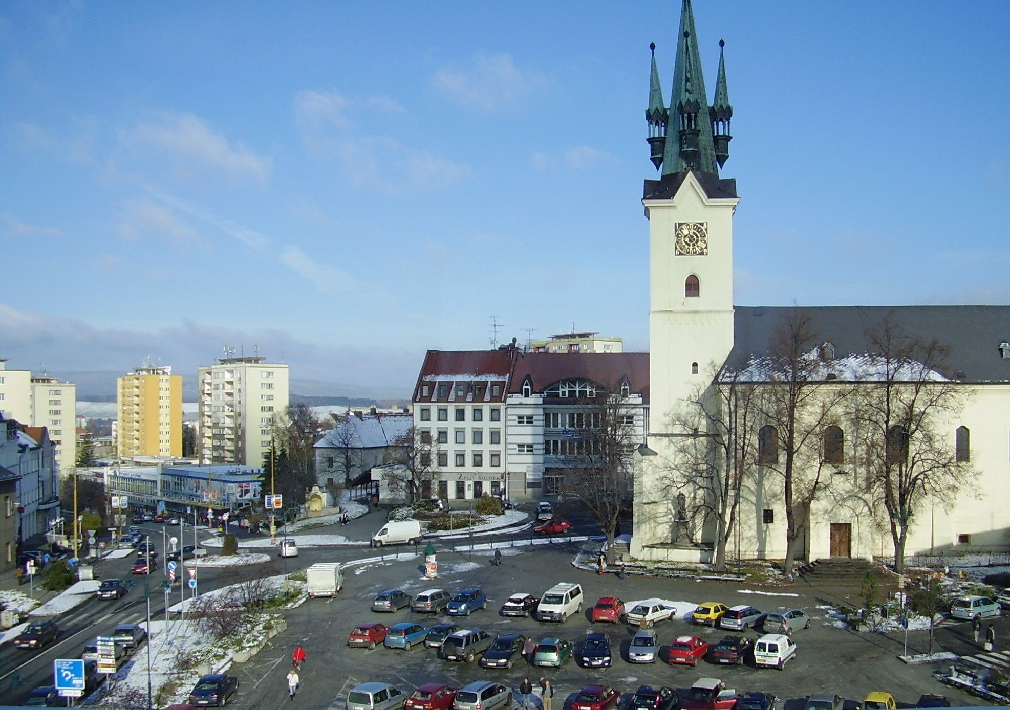 Česky: Příbram I - náměstí T. G. Masaryka.